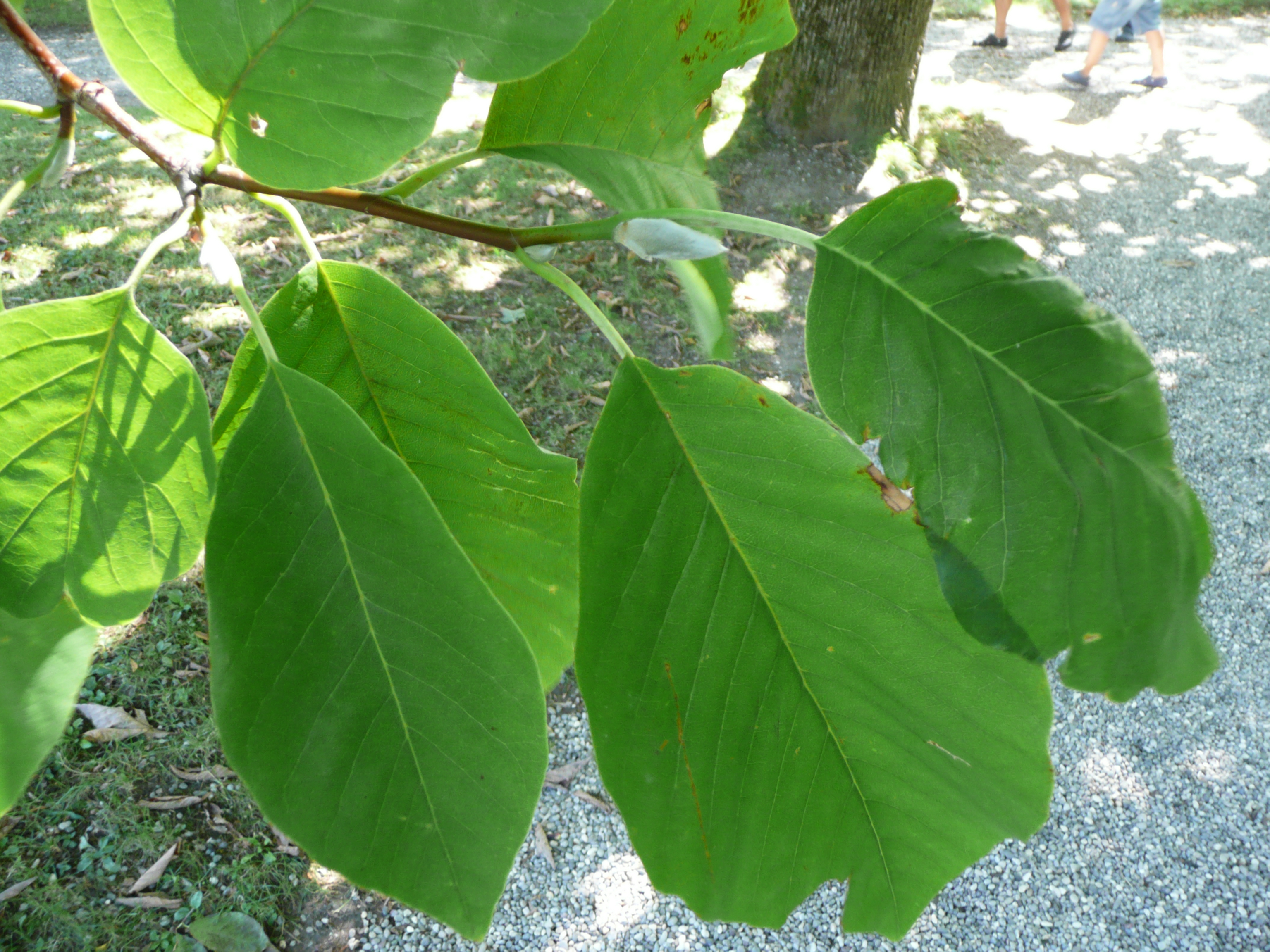 Magnolia acuminata in Botanical garden of Geneva Map: 46° 13' 32" N 6° 8' 48" E